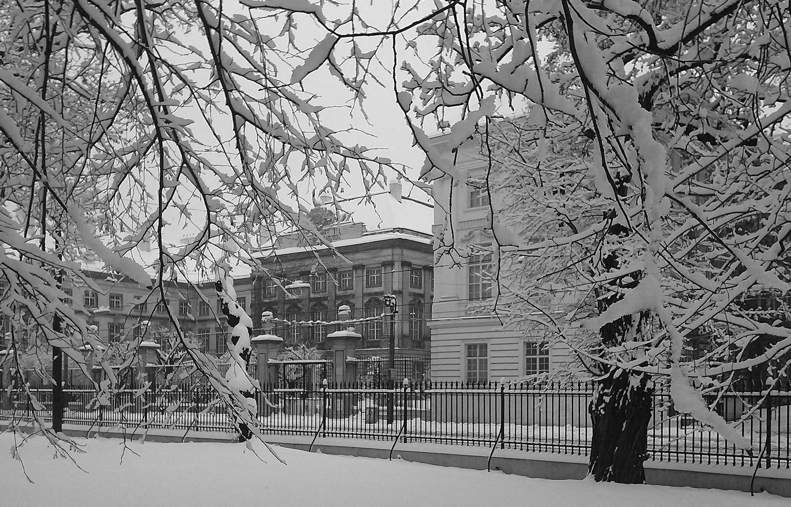 Josephinum in der Alservorstadt, Vienna, Austria